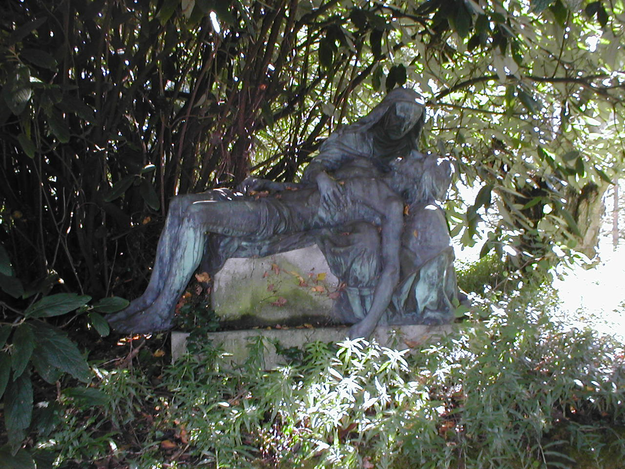 Pieta von Robert Poetzelberger im Ehrenfriedhof Heilbronn